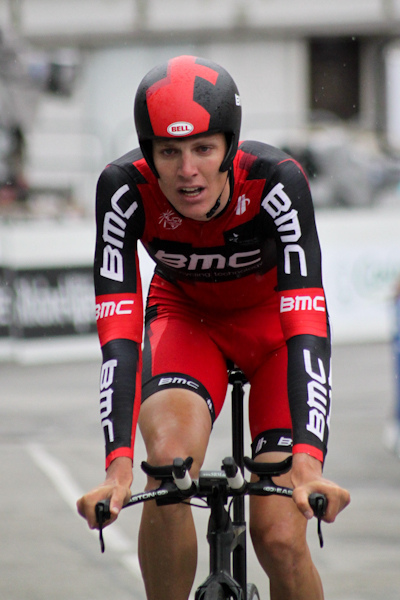 Prologue du Critérium du Dauphiné 2011, Saint Jean de Maurienne